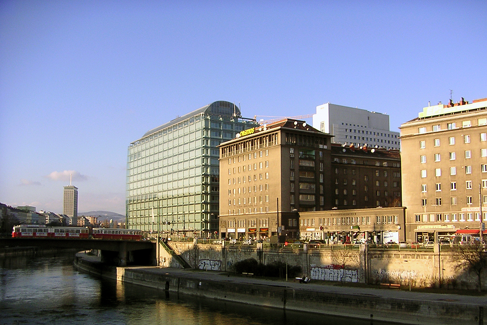 Donaukanal am Schwedenplatz in Wien, selbst fotografiert, im Hintergrund Ringturm